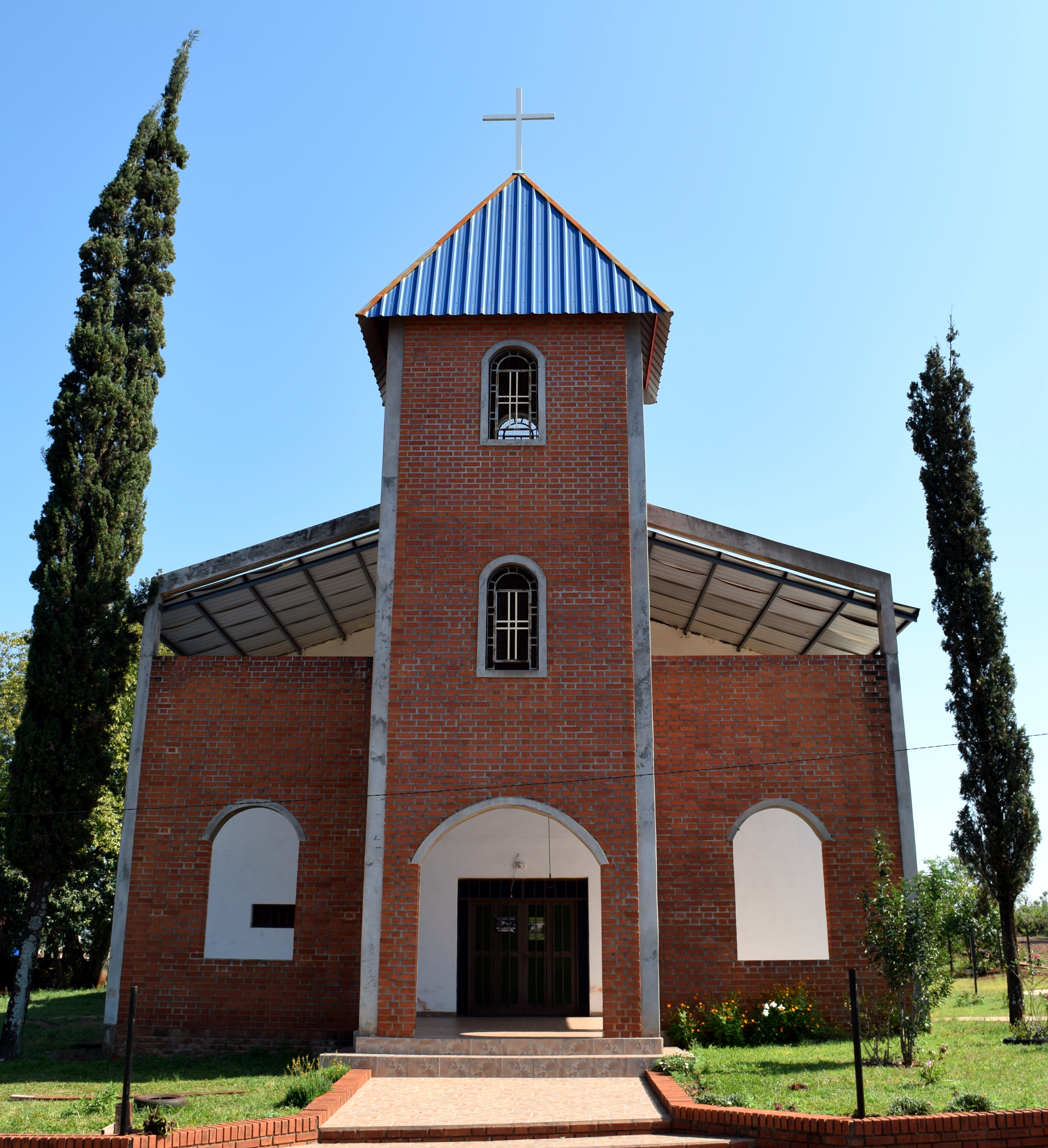 Iglesia católica de la localidad de General Alvear en la provincia de Misiones. Depende de la Diócesis de Oberá.